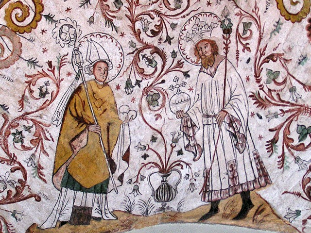 Överselö kyrka